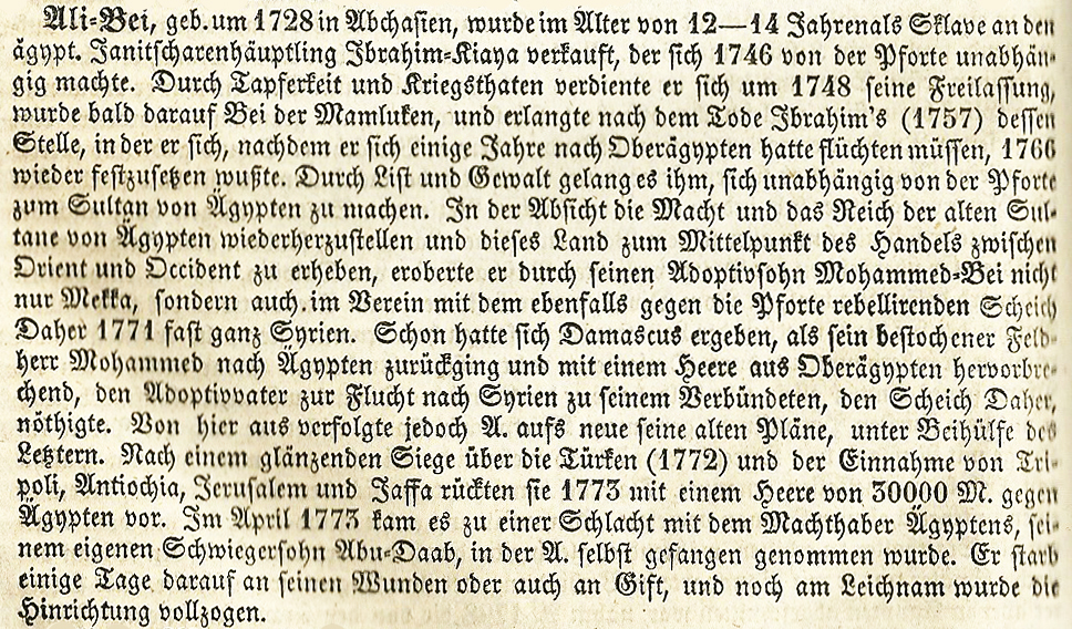 Artikel "Ali Bei" in Brockhaus' Conversations-Lexikon von 1851